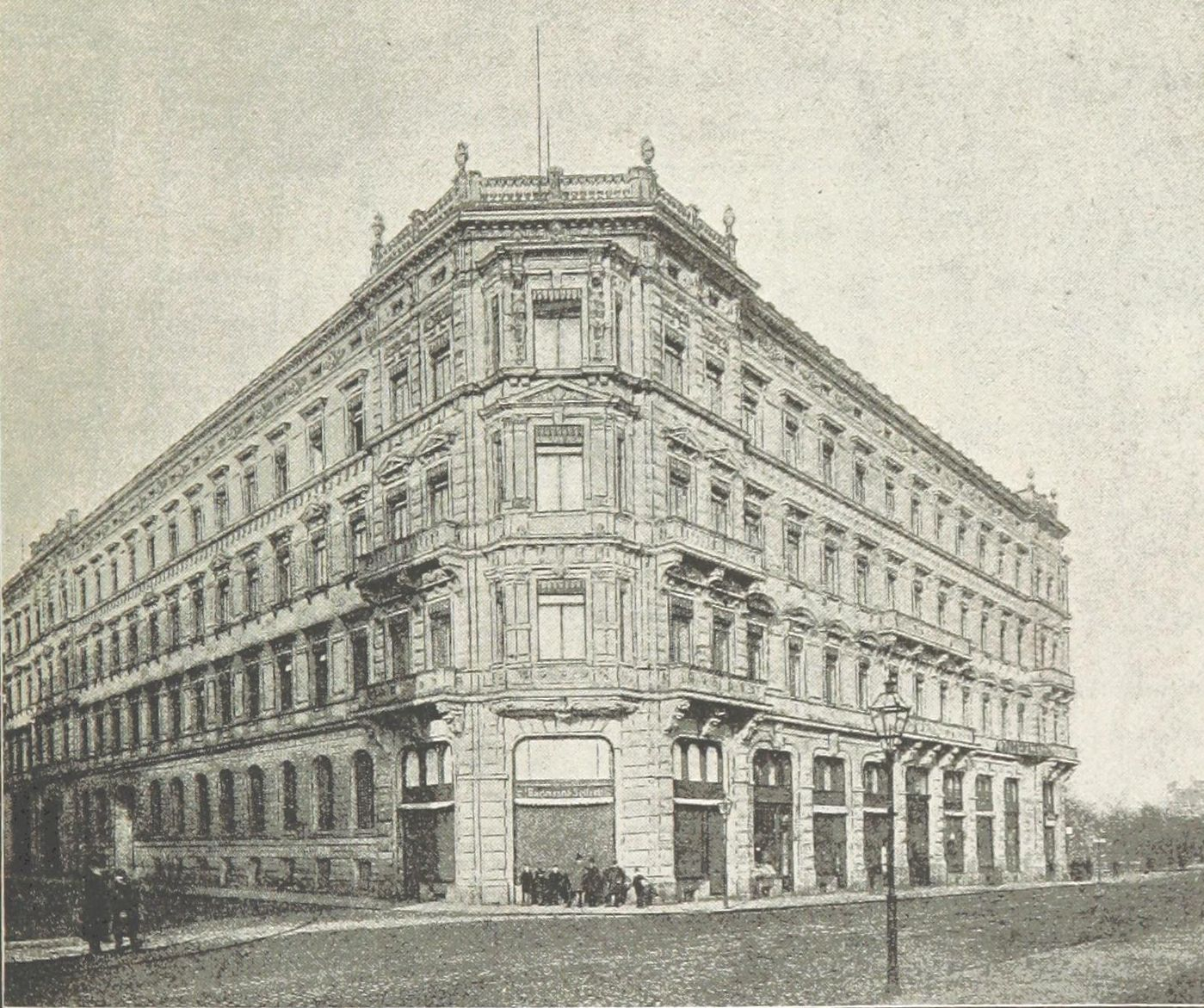 Das Gebäude der Allgemeinen Deutschen Credit-Anstalt (Verwaltungsratsvorsitzender Gustav Harkort) auf dem Karrée Richard-Wagner-Straße - Goethestraße - Brühl erbaut 1872–1874 nach Plänen von Carl Gustav Aeckerlein und Julius Zeißig Ansicht von der Goethestraße auf die Ecke Goethestraße - Brühl